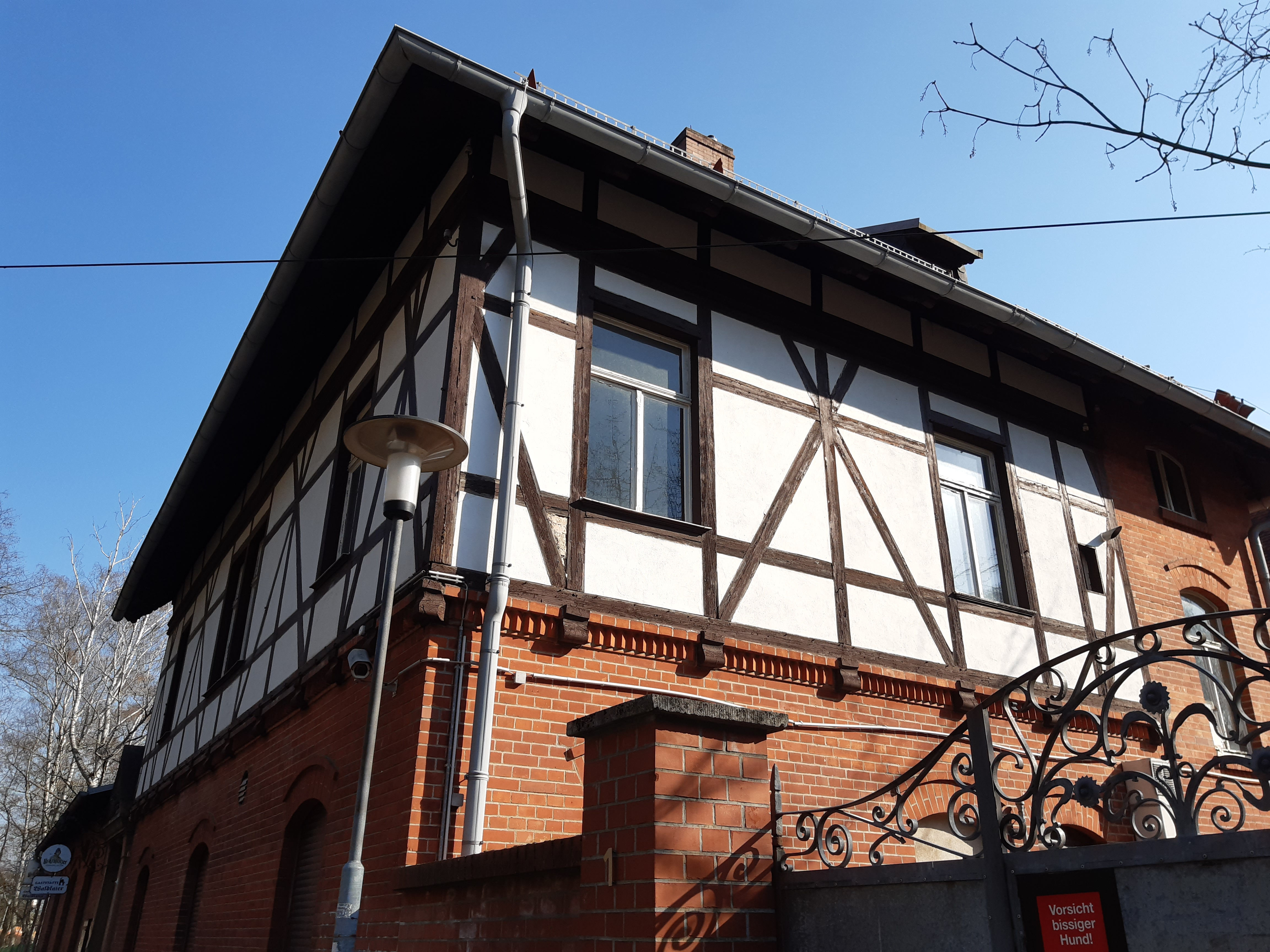 Gstastätte Waldkater, Dölauer Heide, Halle (Saale)